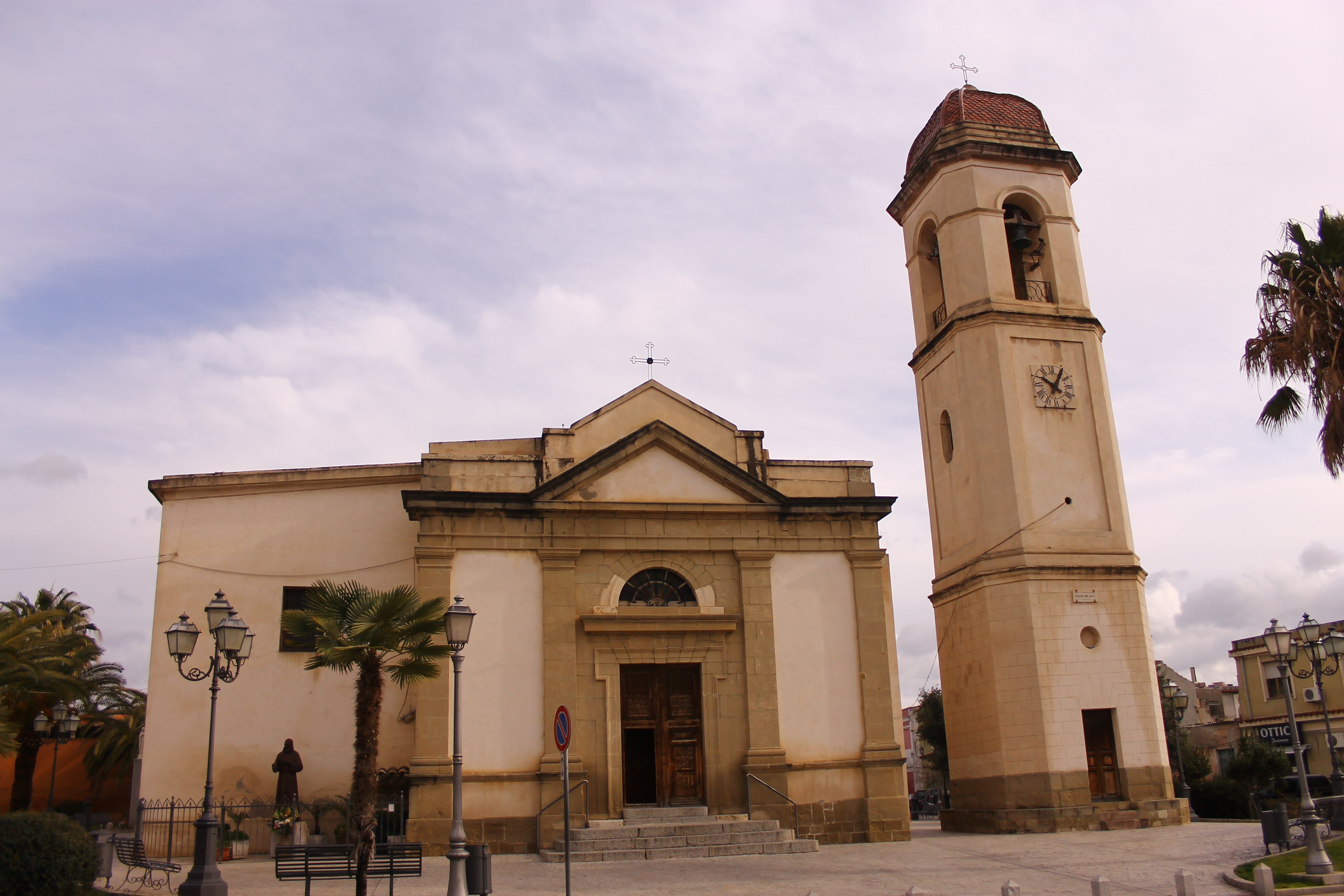 Chiesa della Vergine degli Angeli Maracalagonis